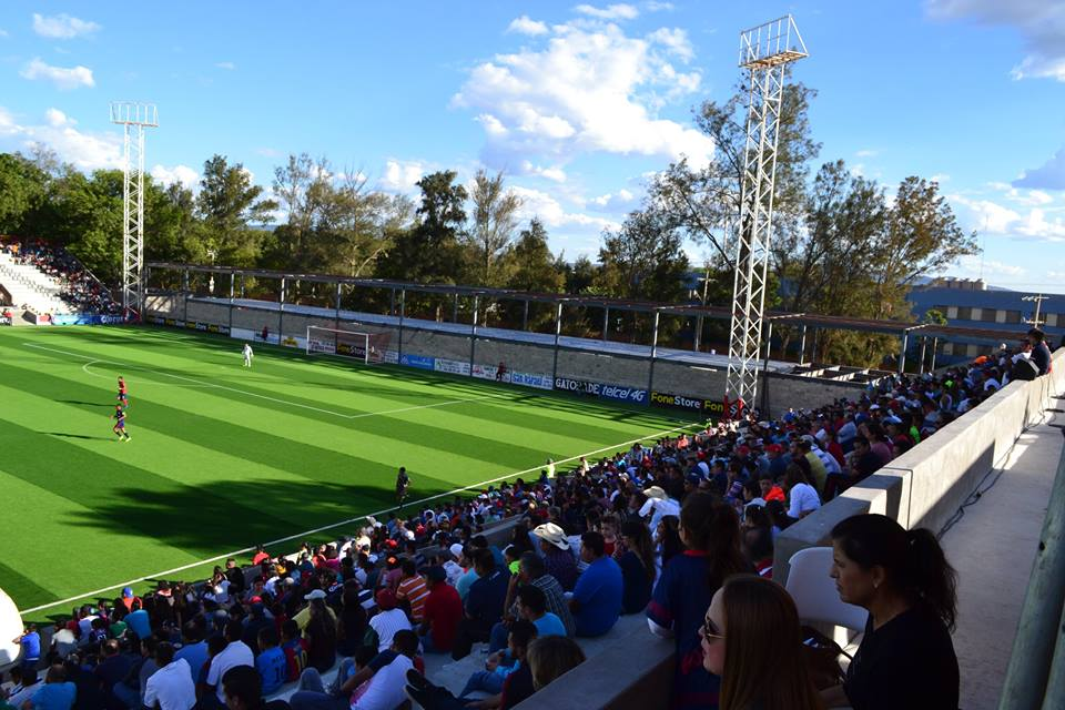 Club Tepatitlan